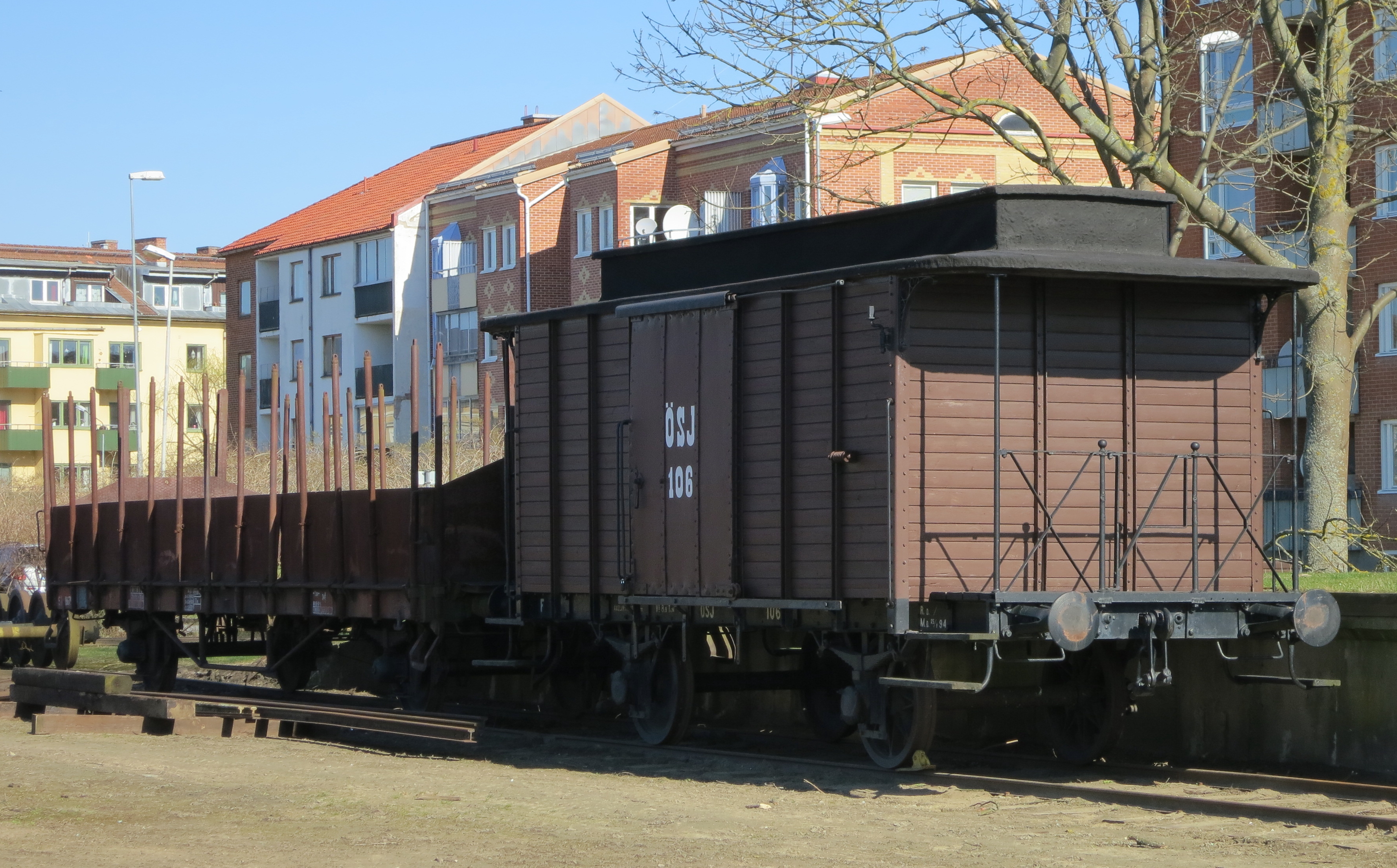 Godsvagnar ÖSJ på Kristianstads järnvägsmuseum